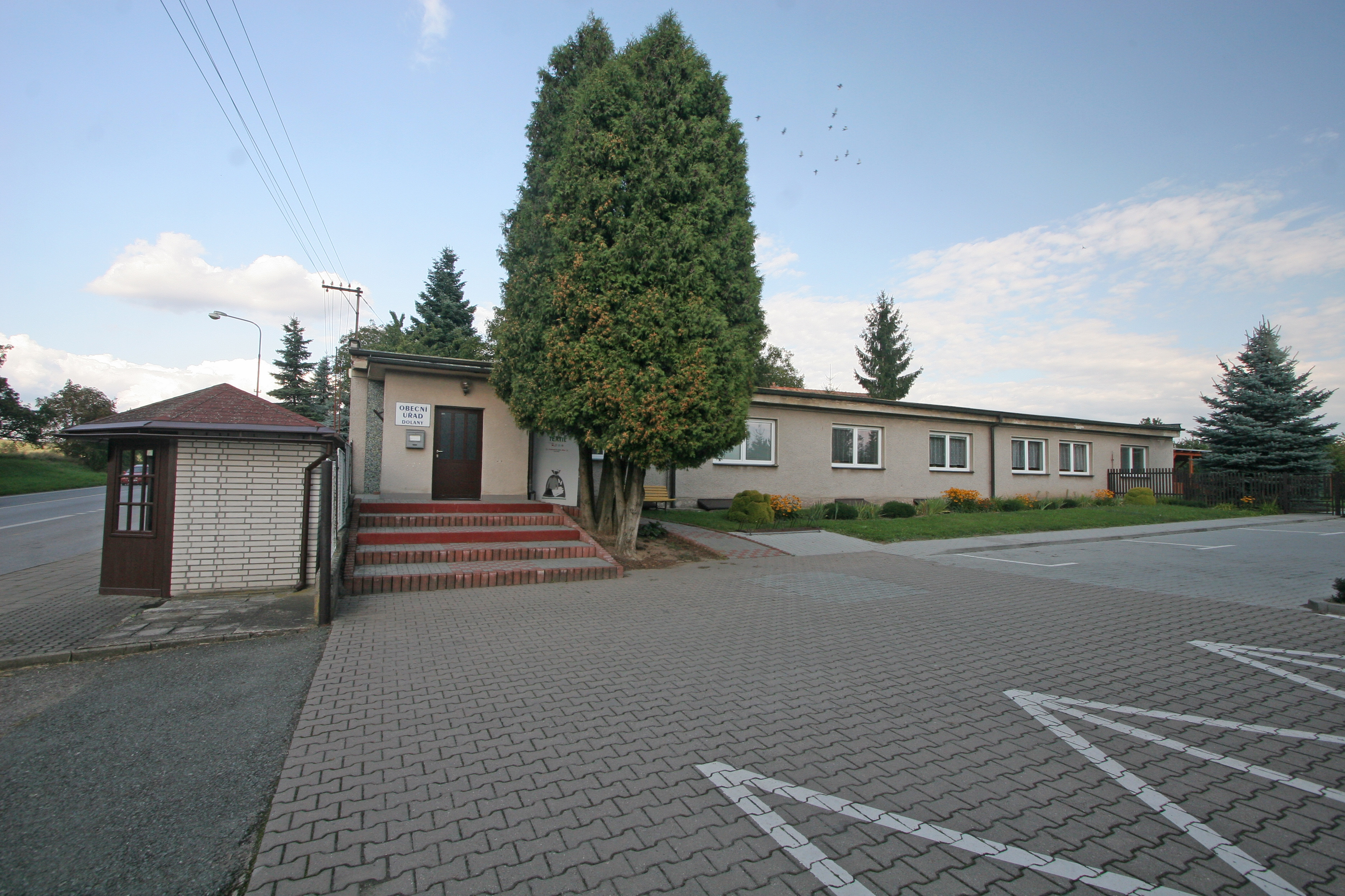 Dolany obecní úřad